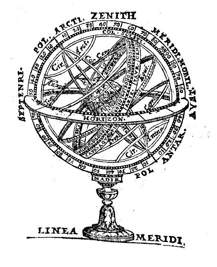 Praxis sphaerica clarissima. De motibus, & proprietatibus celorum, & planetarum, tribus libris disposita, cum questionibus ad sententiam Scoti, ad libros metheorum Aristotelis. Cum duplo indice capitum, & sententiarum. Per mag. Ioan. Baptistam Chiodinum minor. conuentual. .... - Venetiis : apud Ambrosium & Bartholomeum Dei, fratres, 1615 (Venetiis : ex typographia Ambrosij Dei). - [16], 127, [1] p. : ill. ; 8º .